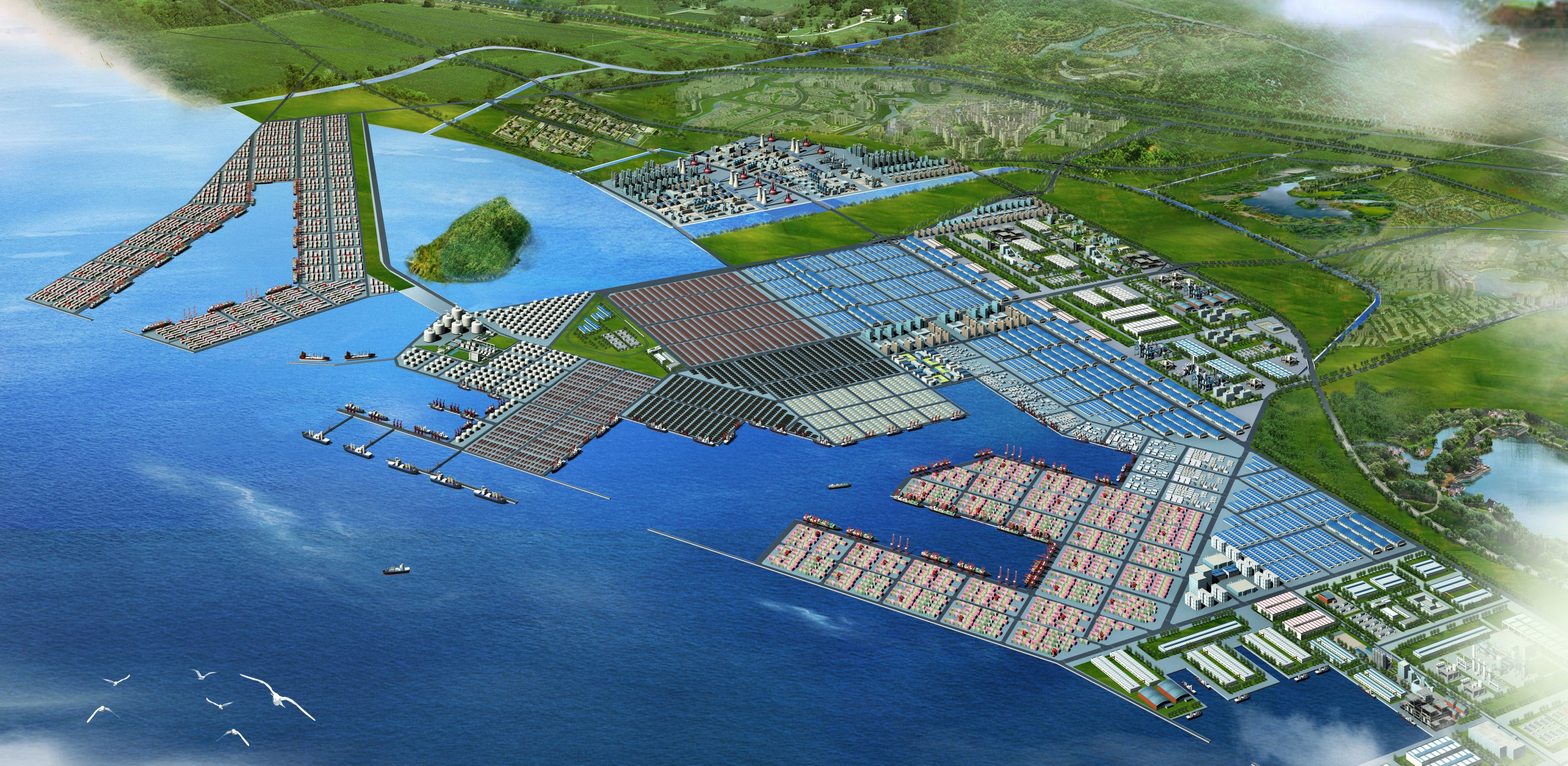 青岛董家口港区规划图